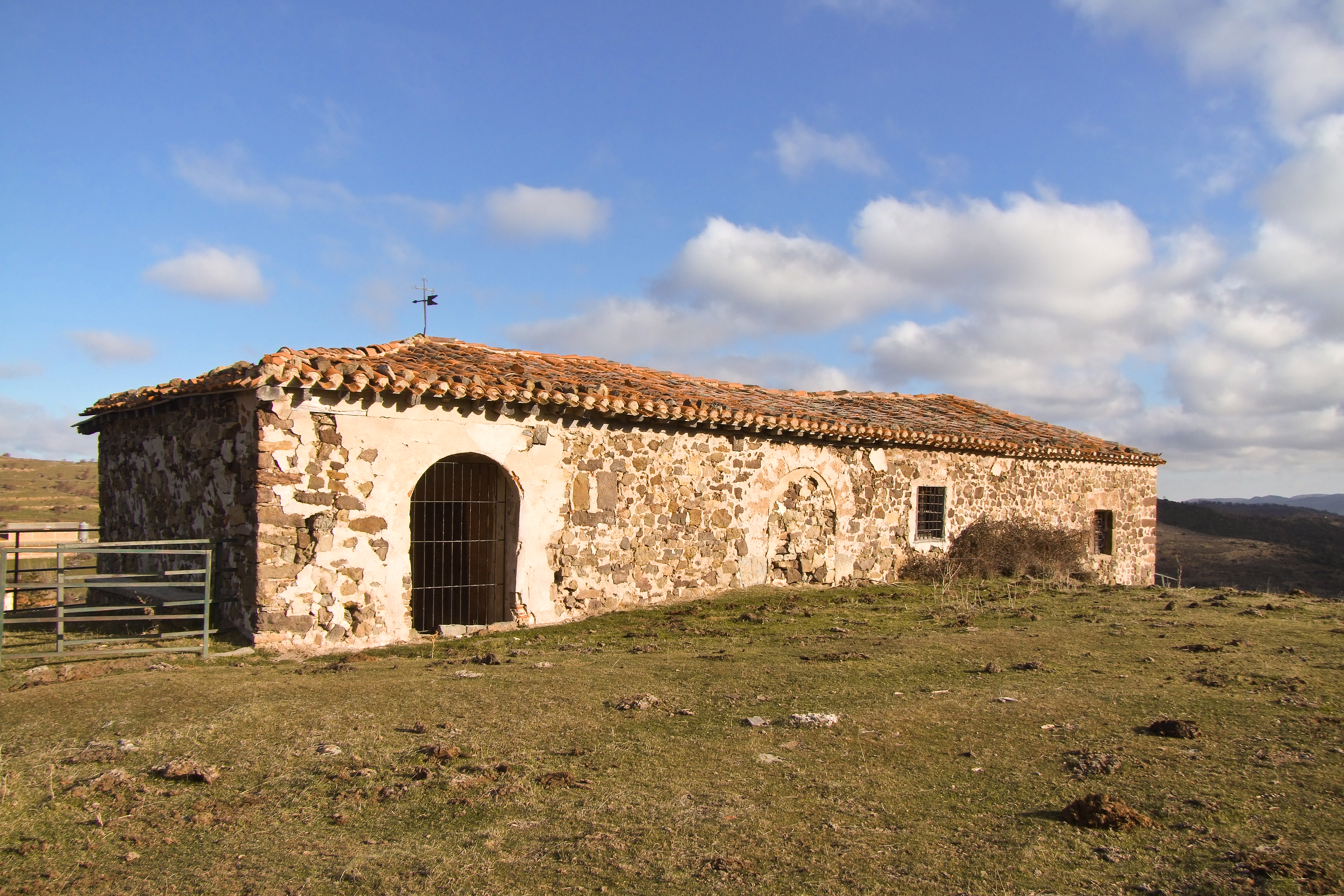 Ermita de la Virgen del Cerro en la localidad de Muro en Cameros, La Rioja - España